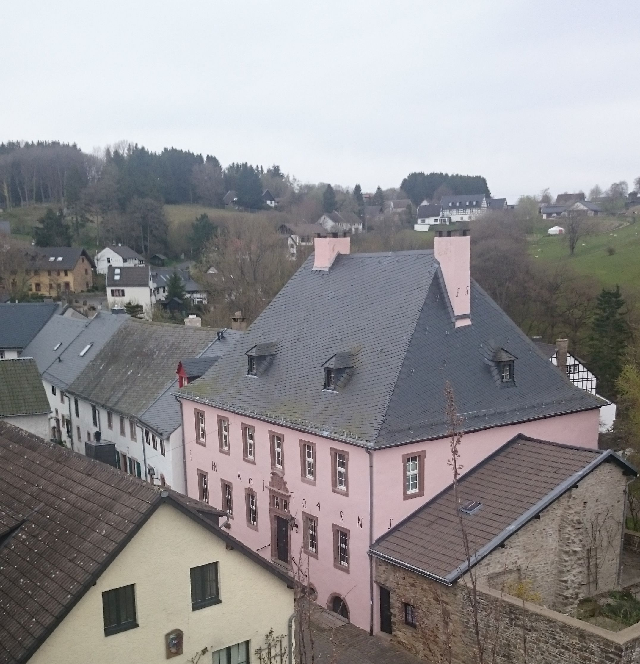 Kronenburg (Dahlem)